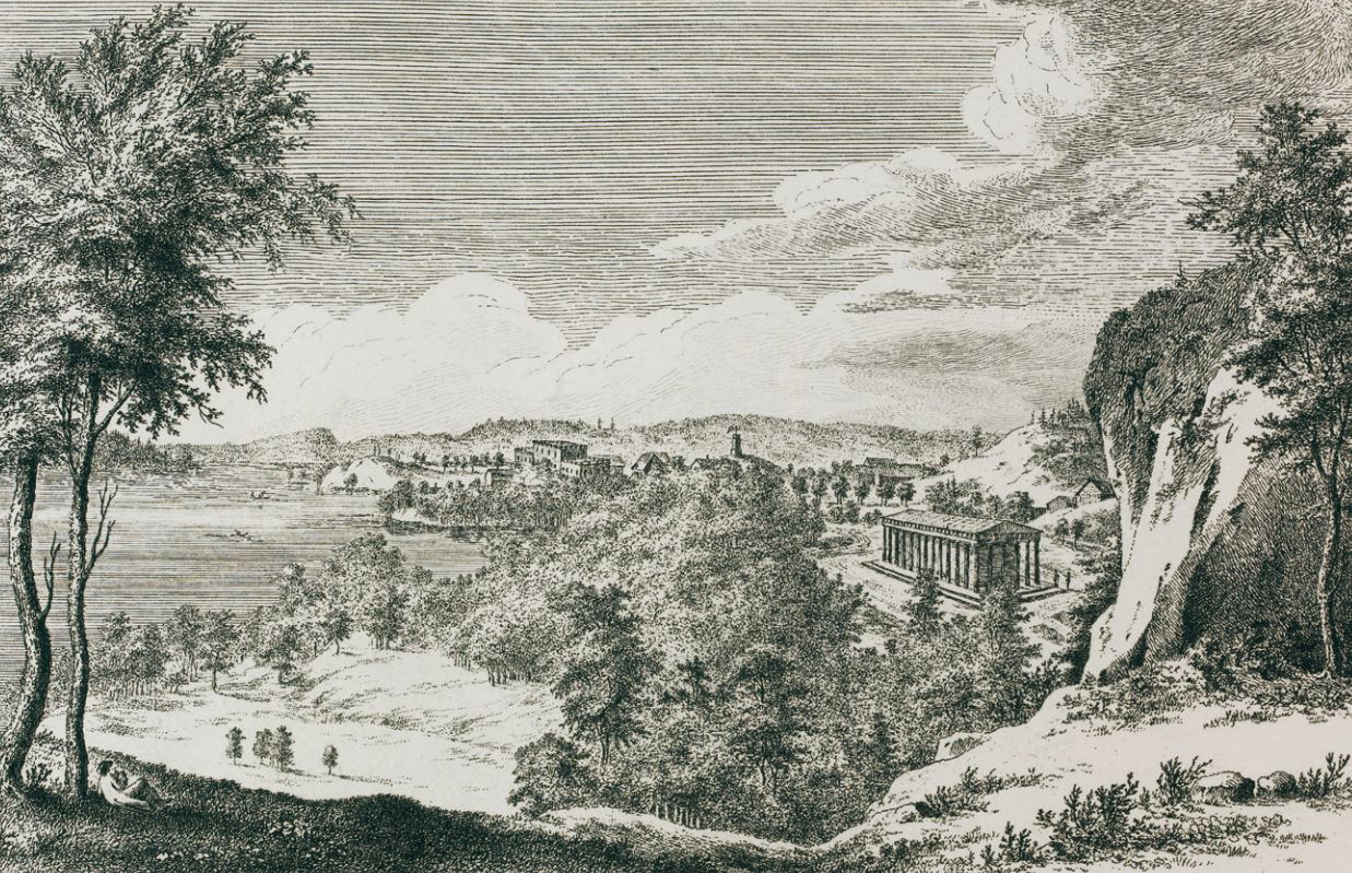 Mälby med templet 1795